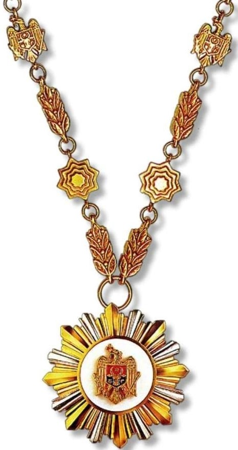 Ordinul Republicii